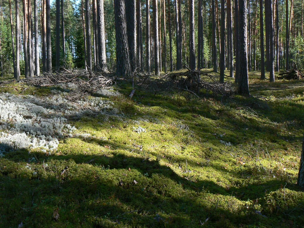 Arniku männik ja muinaskalmed